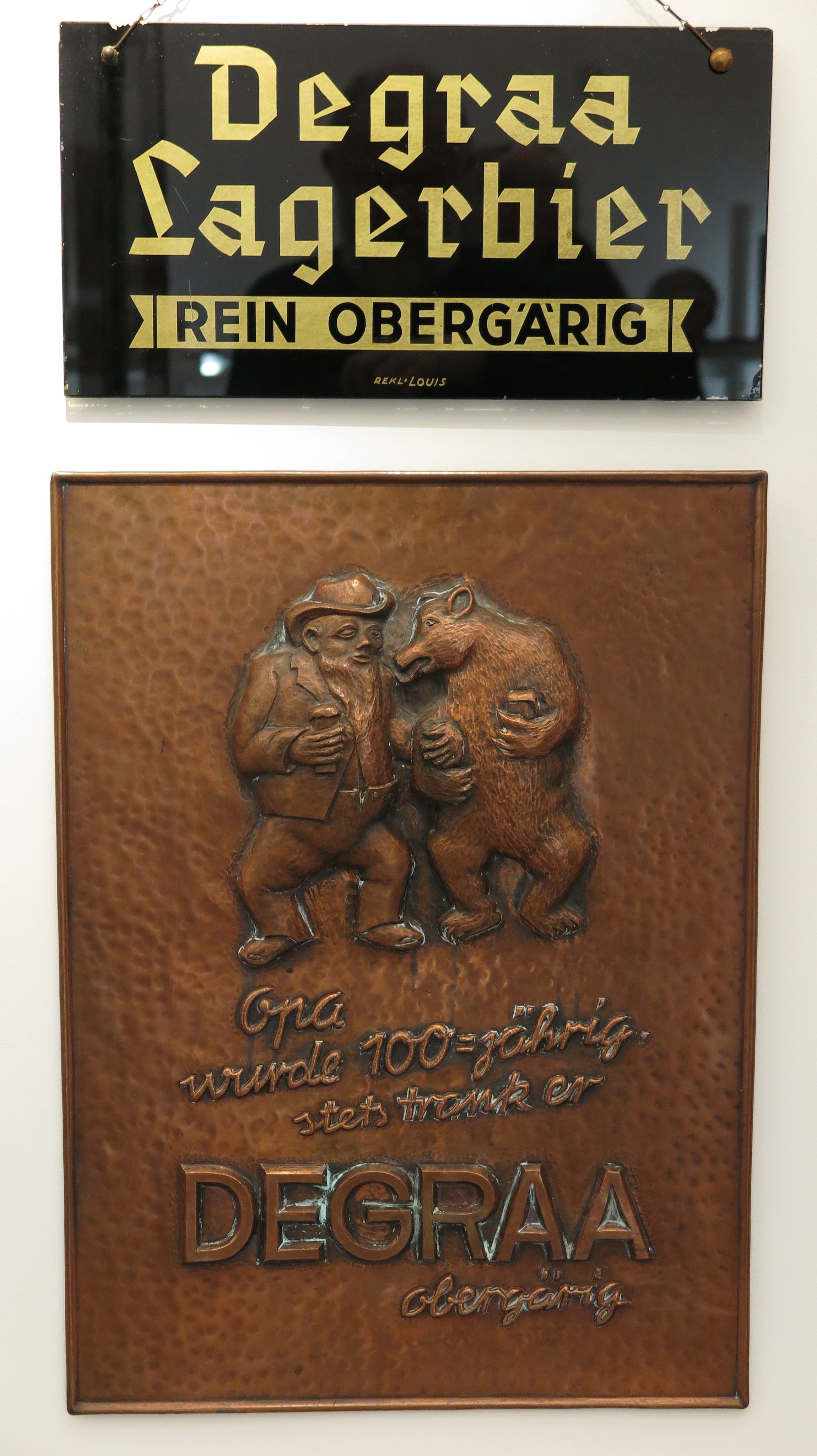 Werbetafeln der ehemaligen Brauerei Degraa in Aachen u.a. mit dem Werbeslogan „Opa wurde 100jährig – stets trank er Degraa obergärig“.